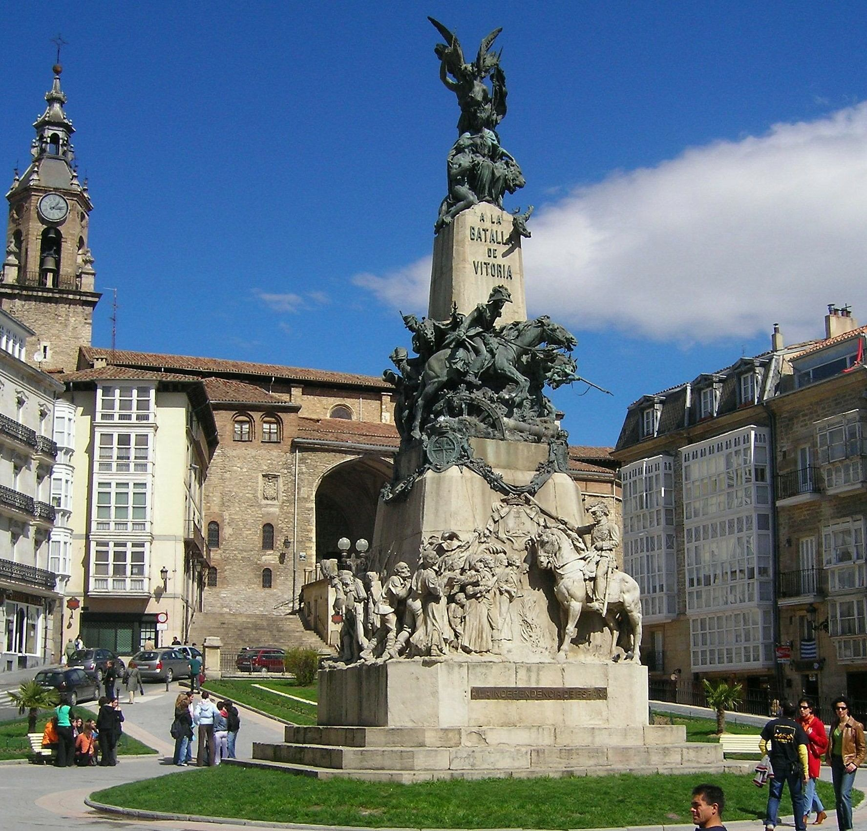 Monumento a la Batalla de Vitoria (1813), en Vitoria-Gasteiz